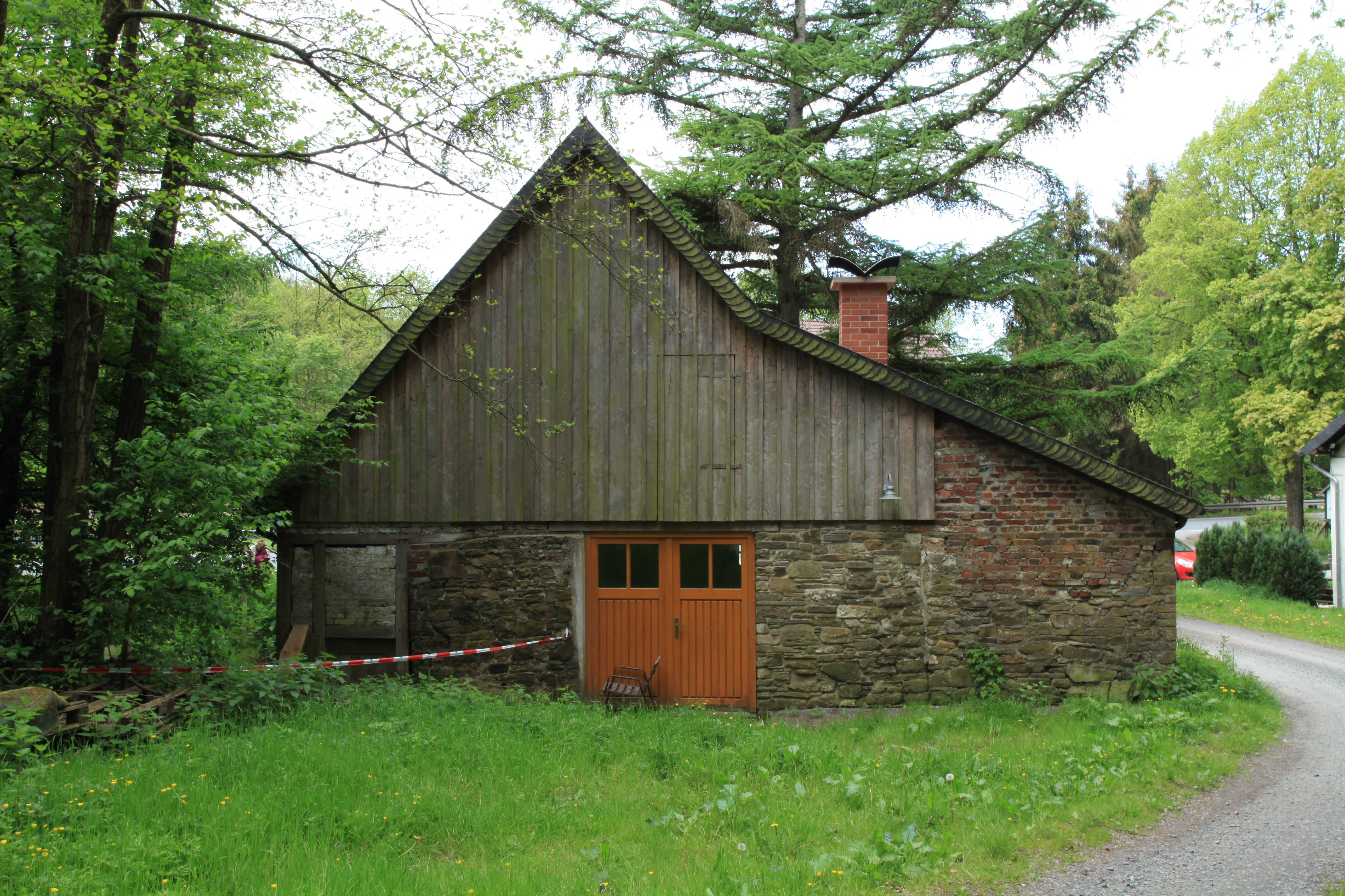 Rhader Mühle, Bollwerkstraße (B54) in Kierspe-Rhadermühle